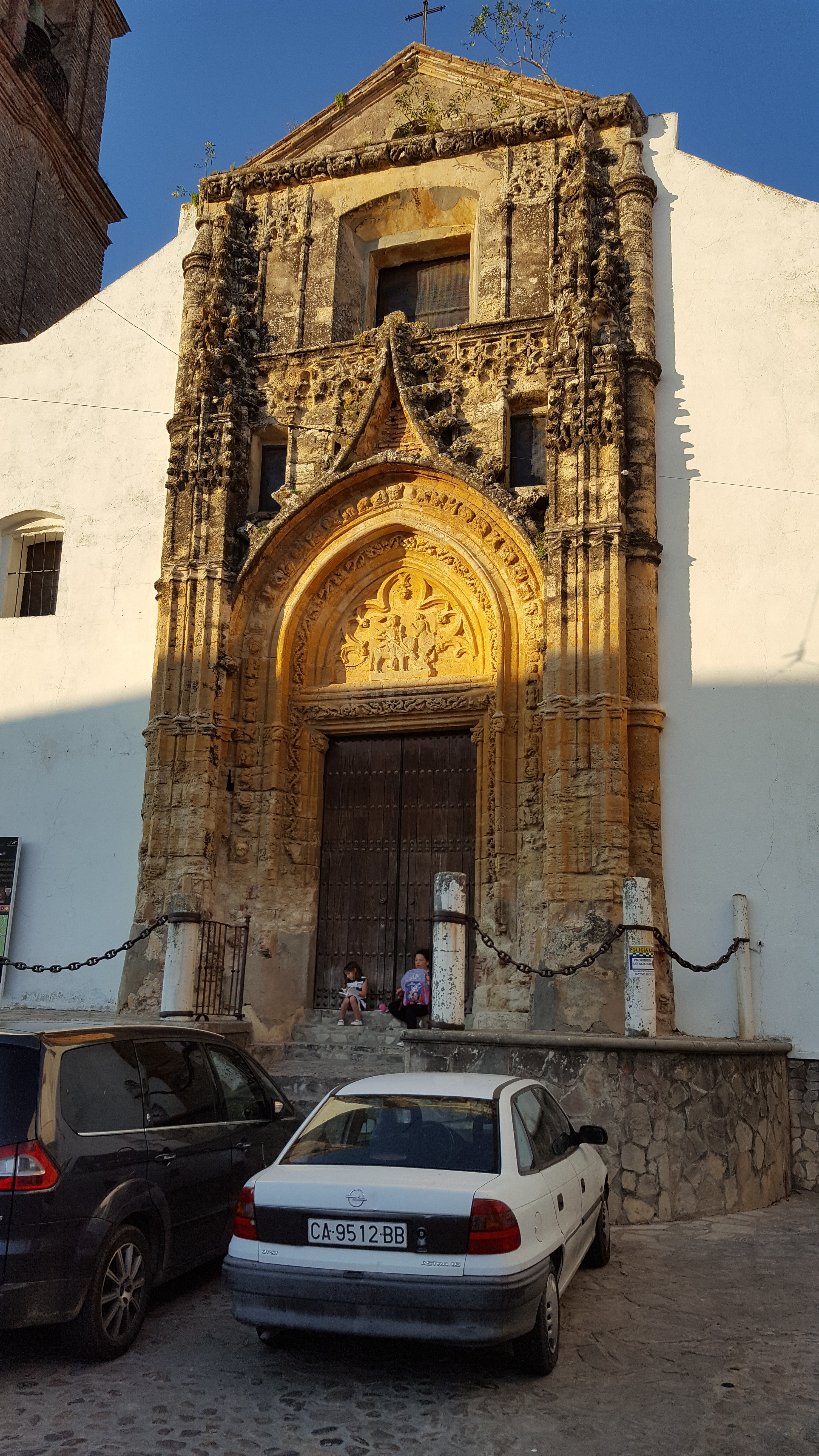 Iglesia de San Jorge Alcalá de los Gazules ; Cádiz, España